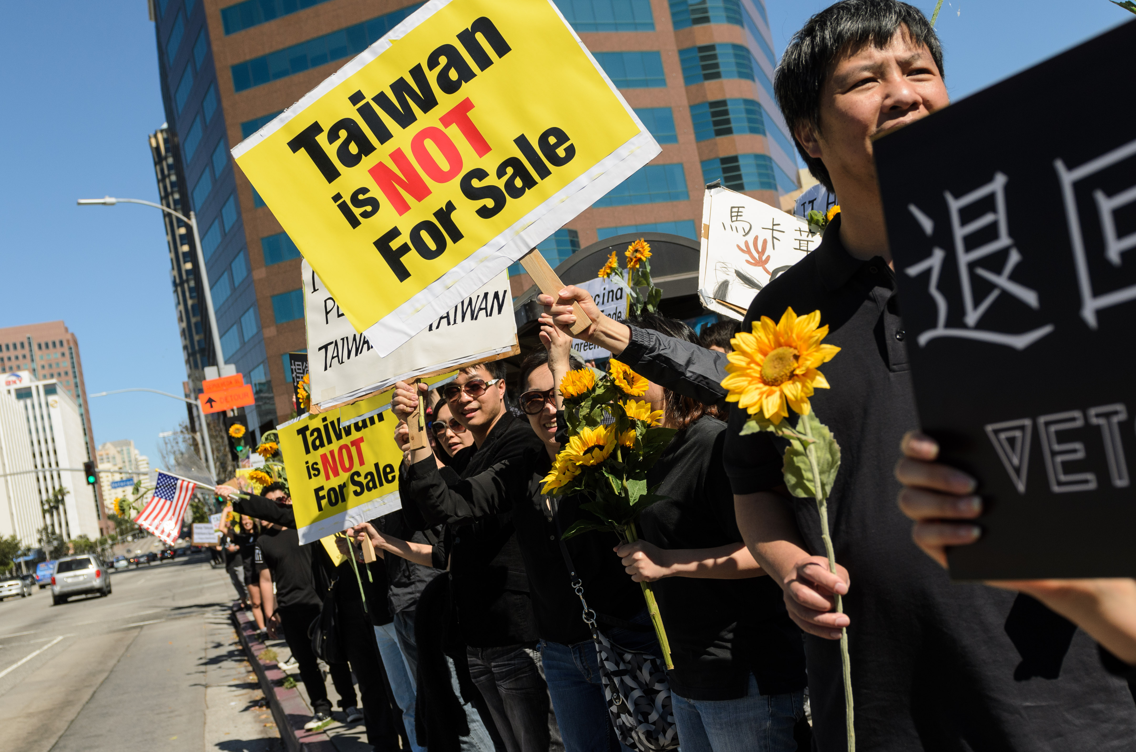 (Benjamin Dunn/Neon Tommy)